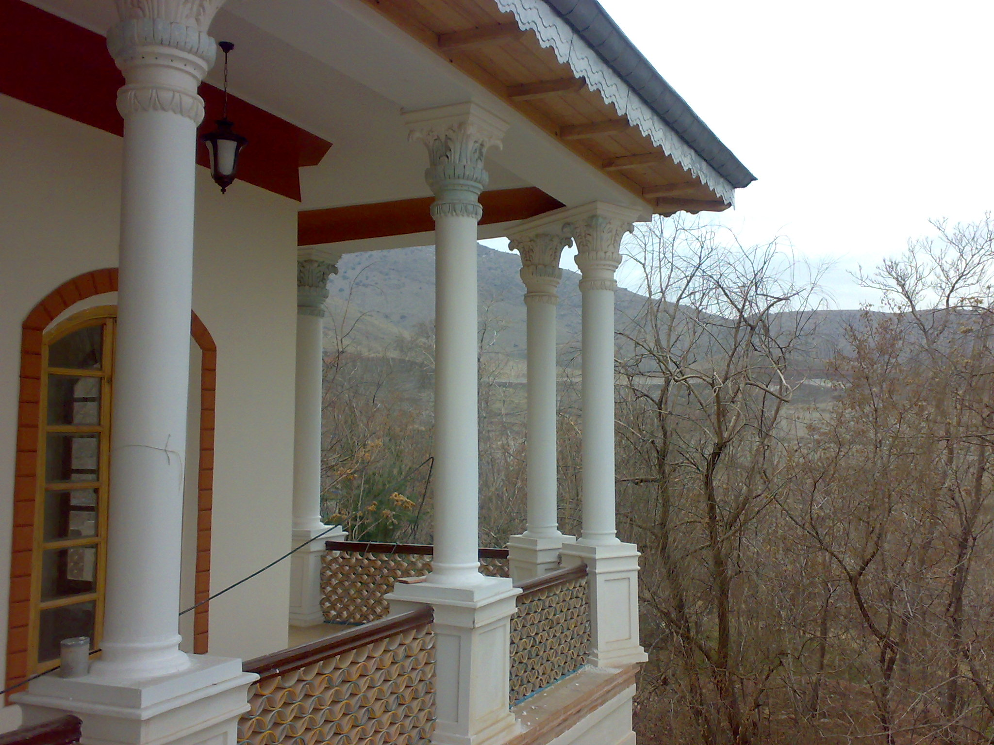 عمارت قصر یاقوت سرخه حصار